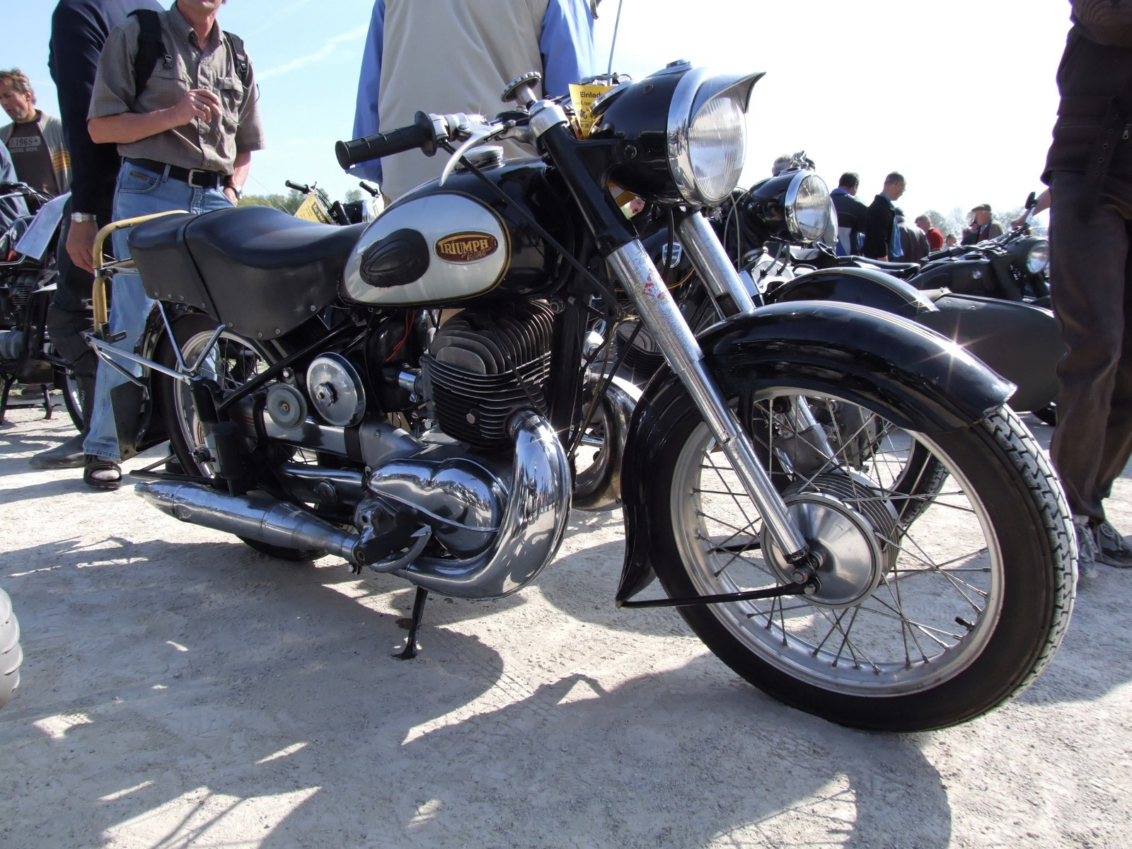 Baujahr: 195. ??? Zul. Gesamtgewicht: 333kg Hubraum: 3.1ccm ??? Quelle: selbst fotografiert, 04/2007 Fotograf: Späth Chr.